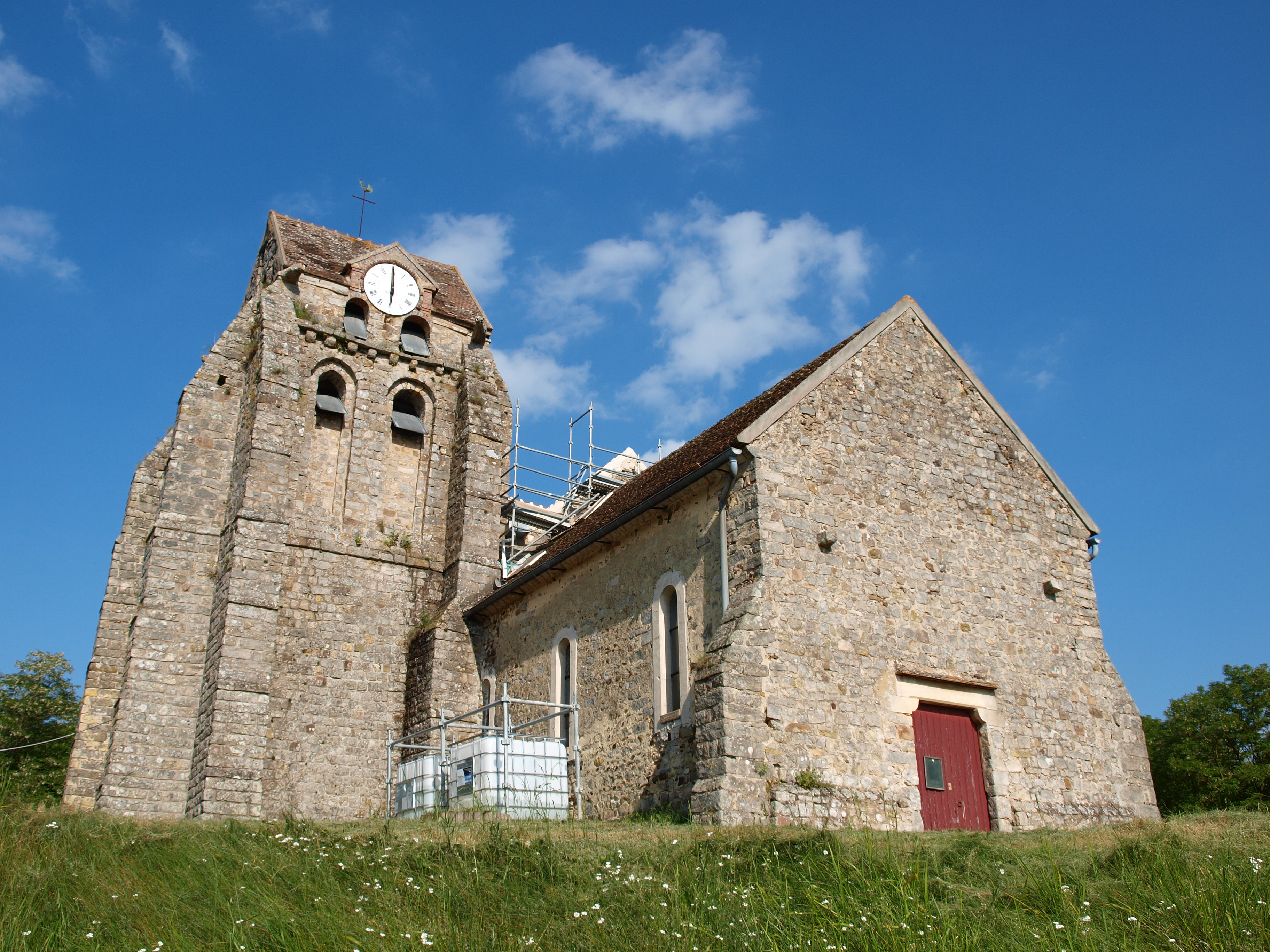 Église Saint-Martin de Montmachoux (Seine-et-Marne, France)